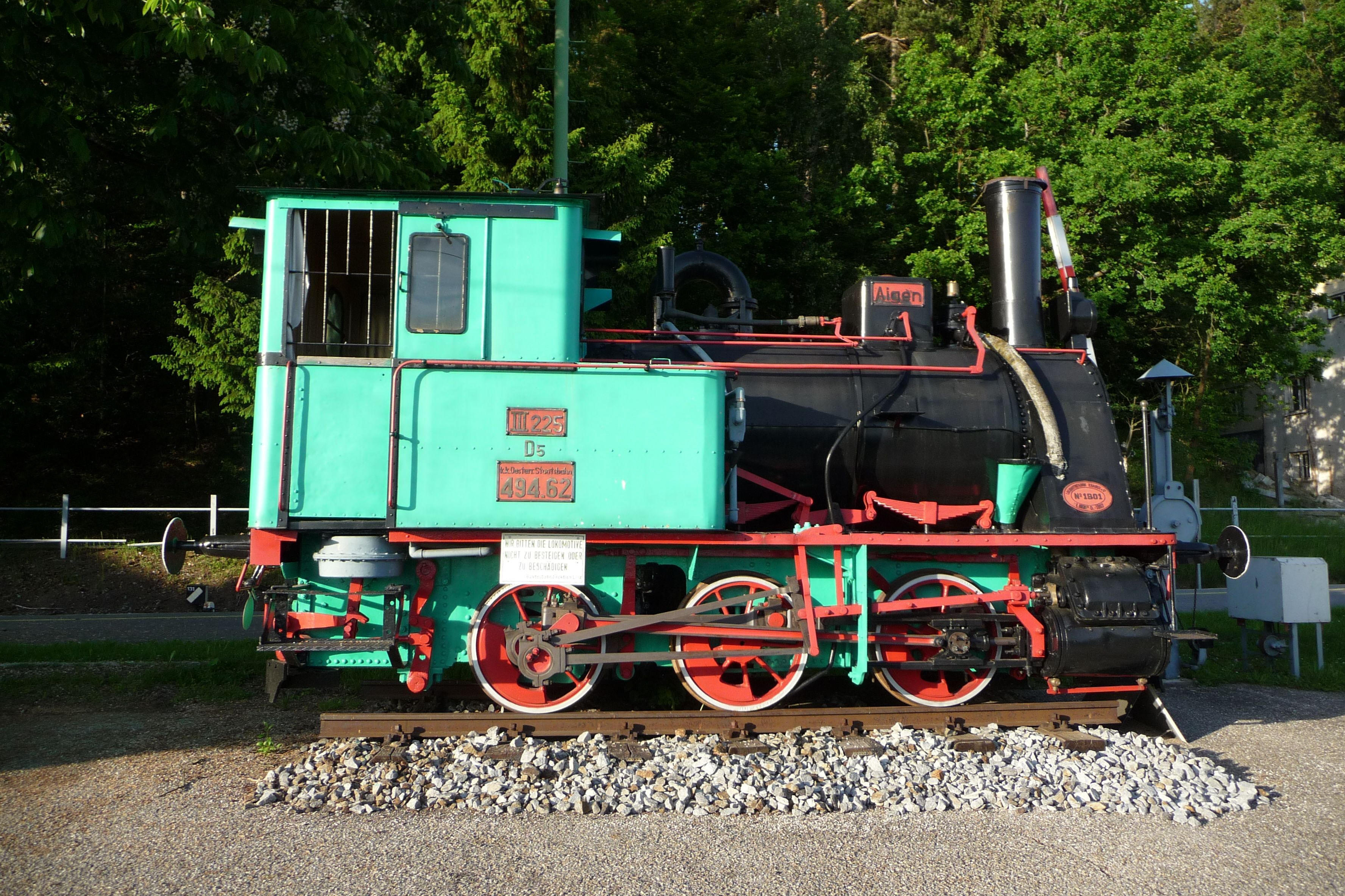 Lokomotive "Aigen" des Mühlkreisbahn-Museums kkStB 494